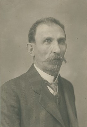 Снимка на Илион Стамболиев.